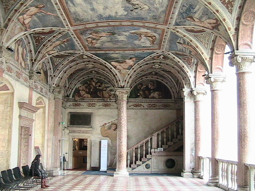 Trento- Castello del Buonconsiglio